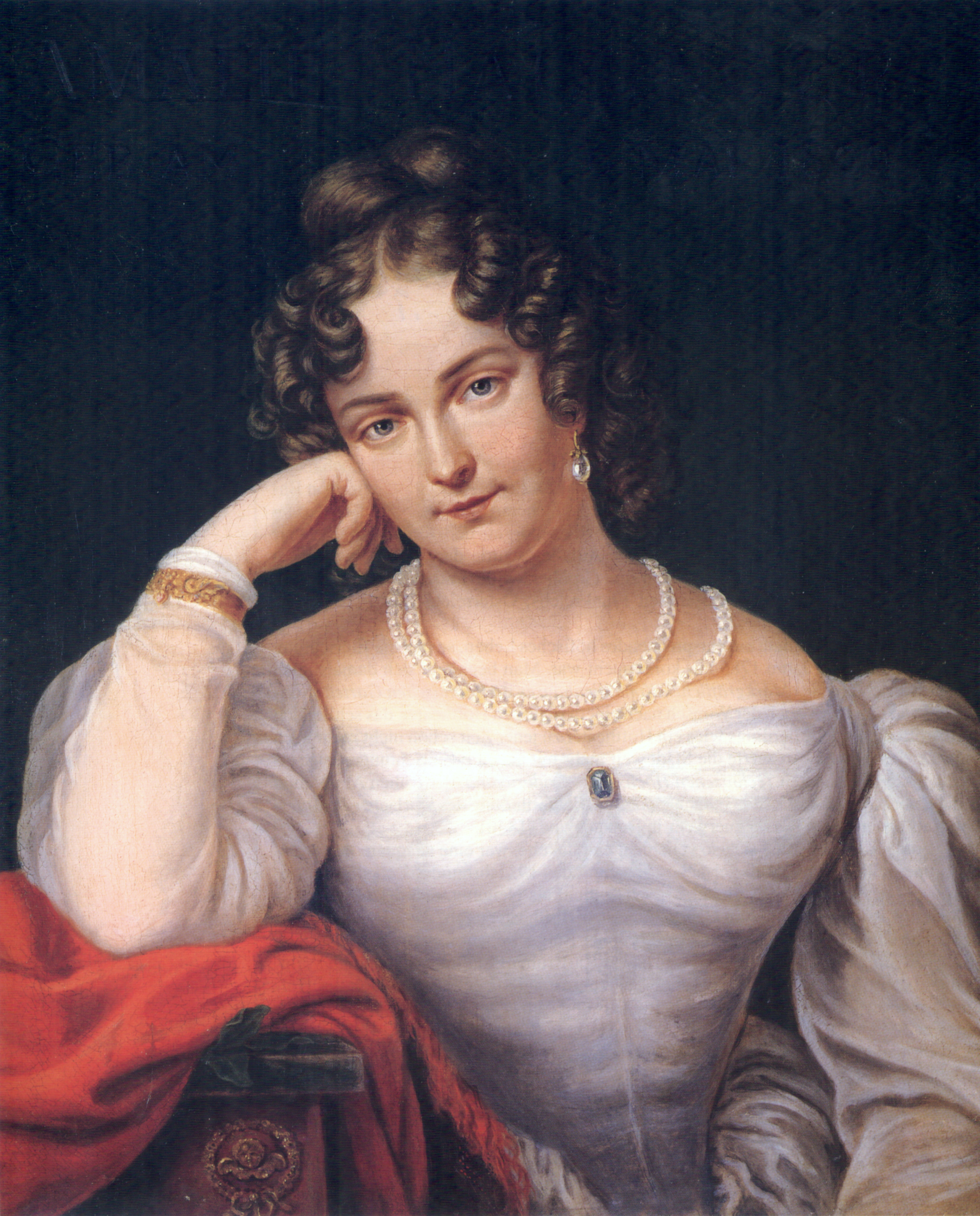 Schauspielerin am Karlsruher Hoftheater von 1815 bis 1846)